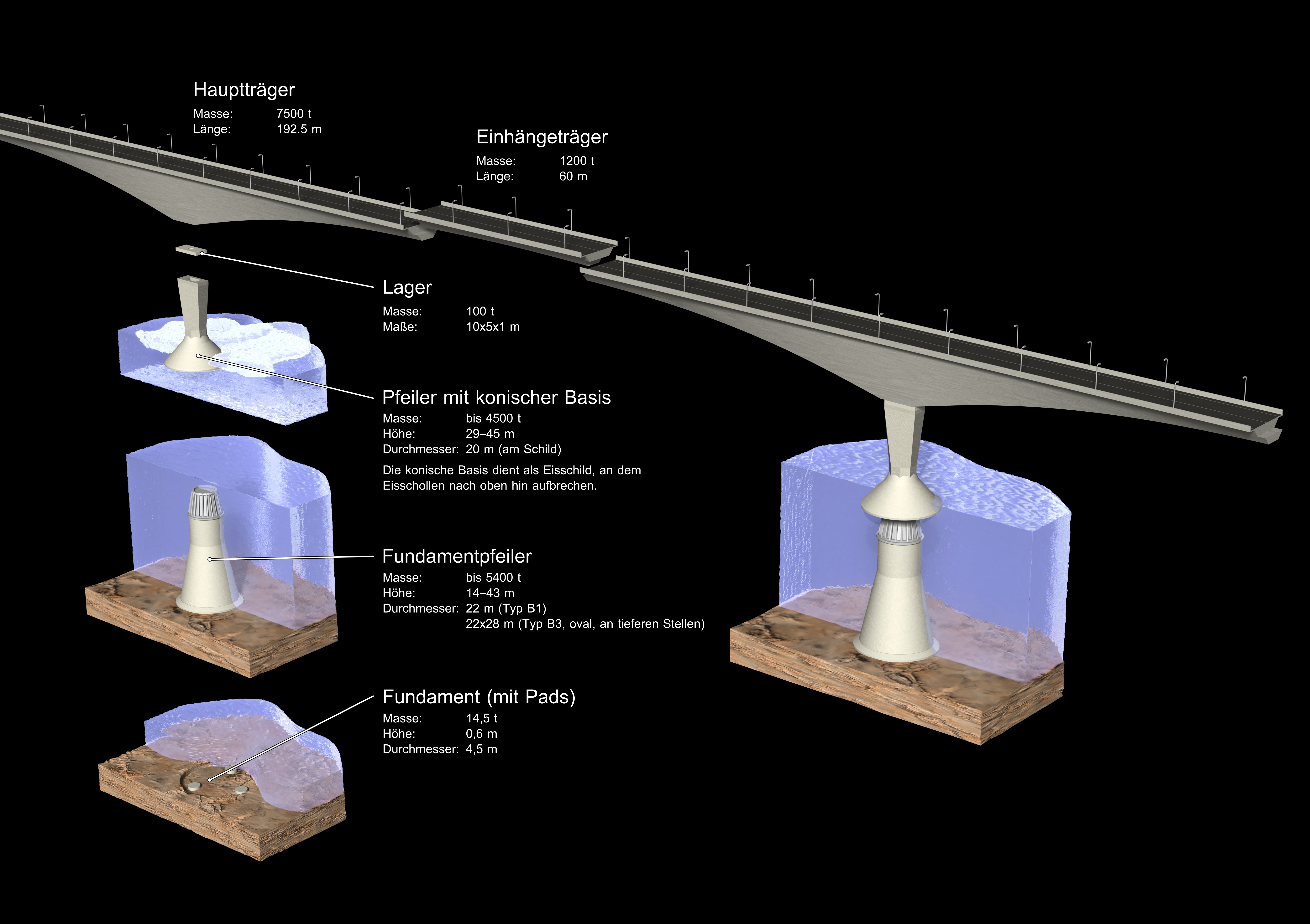 Modell eines Segments der Confederation Bridge mit Beschriftung.